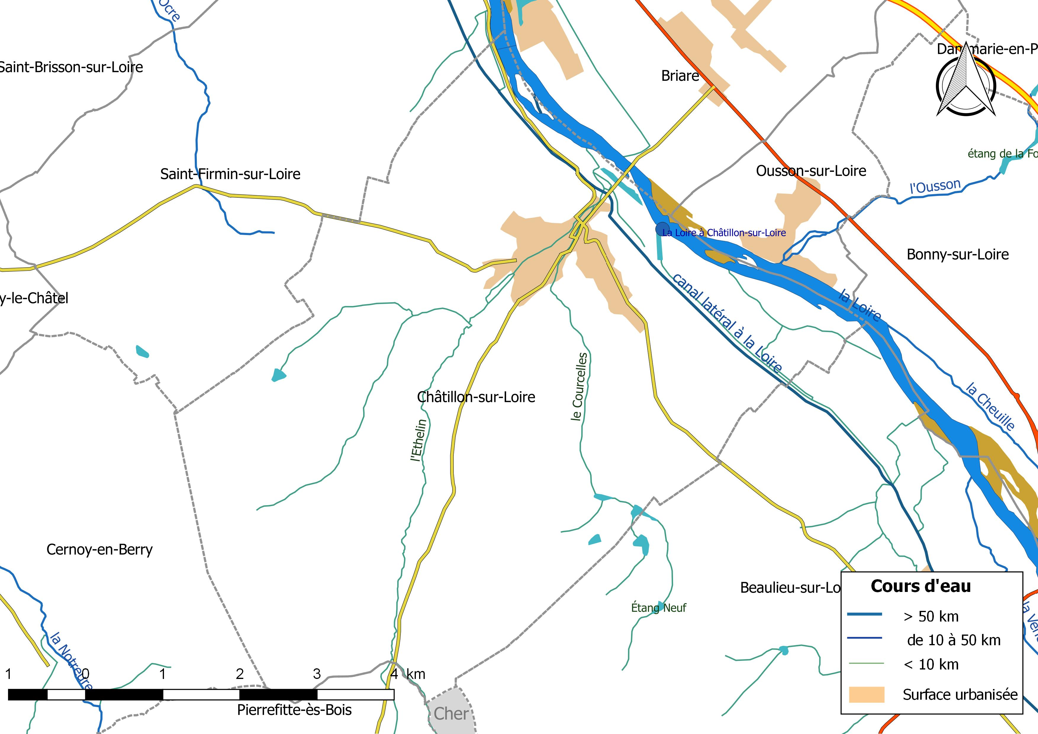 Carte du réseau hydrographique de la commune de Châtillon-sur-Loire (France).